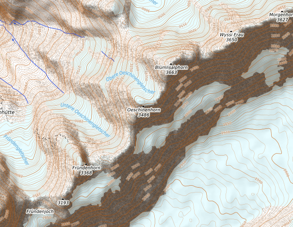 carte réalisée sur umap This map may be incomplete, and may contain errors. Don't rely solely on it for navigation.